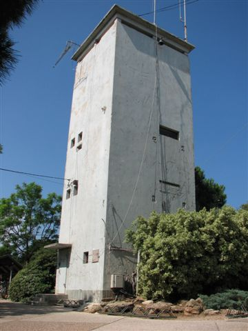 מגדל מים וביטחון בלב המושב רגבה, 7/2009